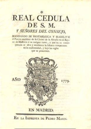 Real Cedula de S.M. y Señores del Consejo, mandando se restablezca y habilite el Puerto maritimo de la Ciudad de la Alcudia en el Reyno de Mallorca á su antiguo curso, y que en su consequencia se abra y establezca la Aduana competente en la conformidad, y bajo las reglas que se prescriben